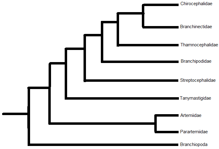 philogenetic tree of anostraca acording to Weekers, P. H., Murugan, G., Vanfleteren, J. R., Belk, D., & Dumont, H. J. (2002). Phylogenetic analysis of anostracans (Branchiopoda: Anostraca) inferred from nuclear 18S ribosomal DNA (18S rDNA) sequences. Molecular Phylogenetics and Evolution, 25(3), 535-544.